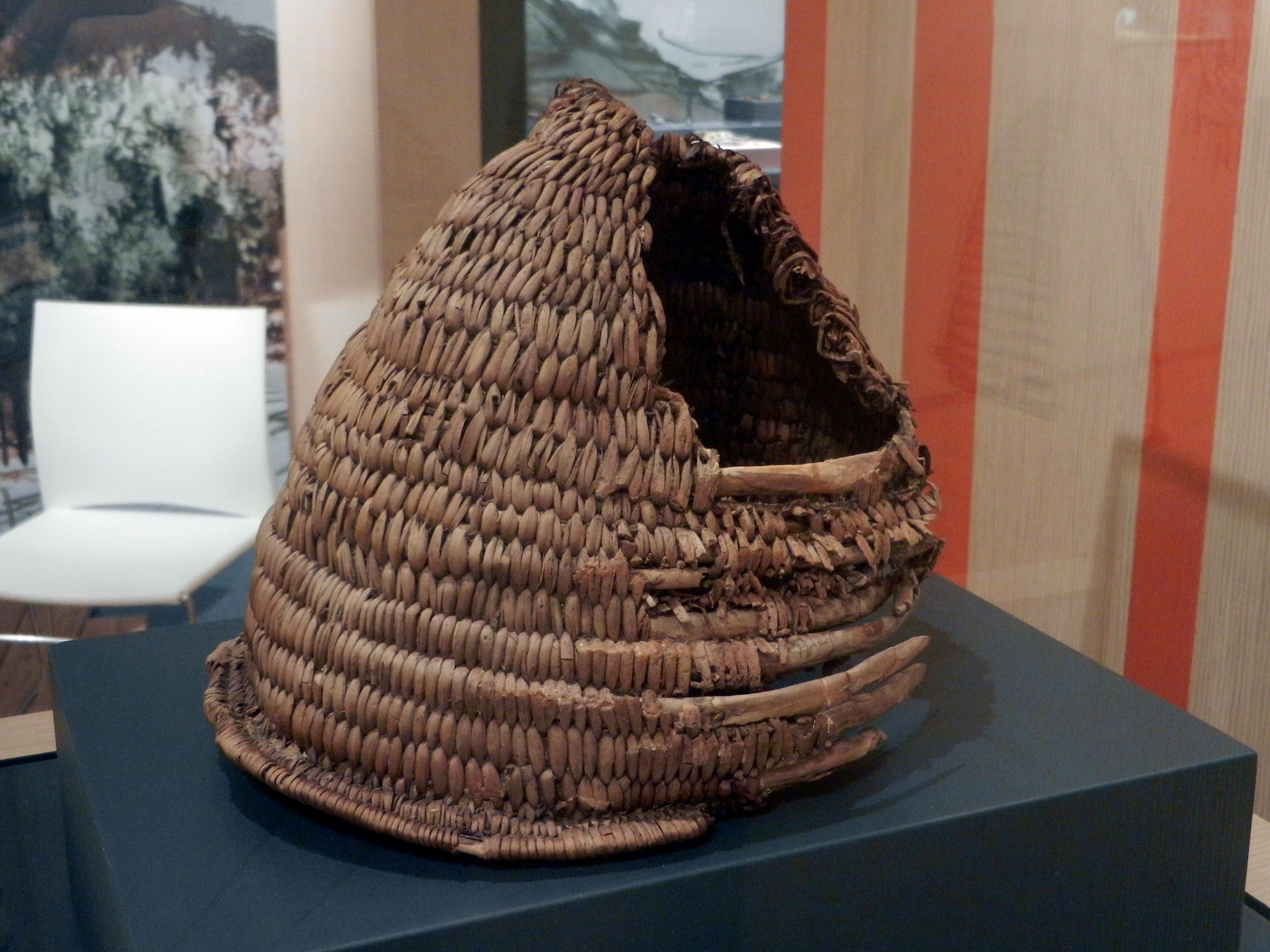 Copricapo in rametti di pino e viburno. L'apertura sulla cima lascerebbe pensare che forse era ornato da un pennacchio